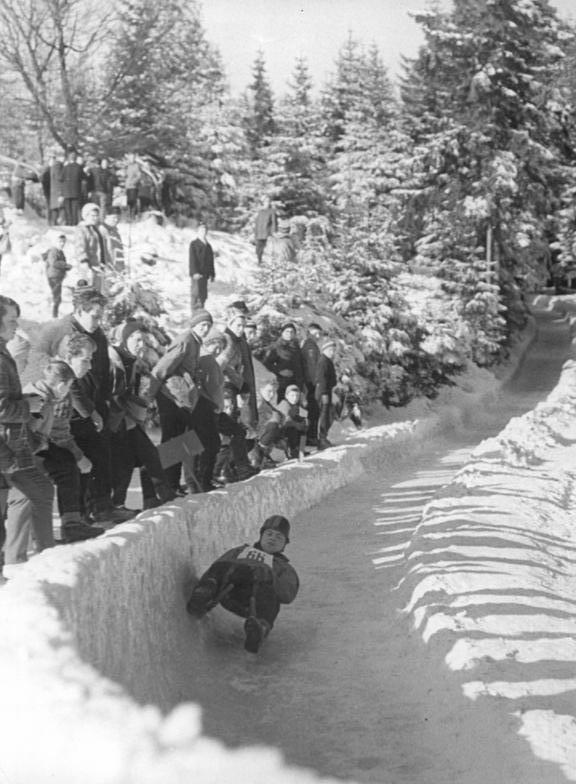 Friedrichroda, Deutsche Meisterschaften, Rennrodeln Zentralbild Gahlbeck 23.2.1964 Friedrichroda erlebte Deutsche Meisterschaften im Rennschlittensport-Deutsche Rennschlittenmeister im Einsitzer wurden am 23.2.1964 in Friedrichsroda (Thüringen) nach dramatischen Kampf die Olympia-Goldmedaillengewinnerin Ortrun Enderlein und der 19jährige Michael Köhler, der Bruder des Goldmedaillengewinners von Innsbruck, Thomas Köhler (beide SC Traktor Oberwiesenthal) UBz: Viele Winterurlauber umsäumten die Eispiste der Bahn in Friedrichroda.